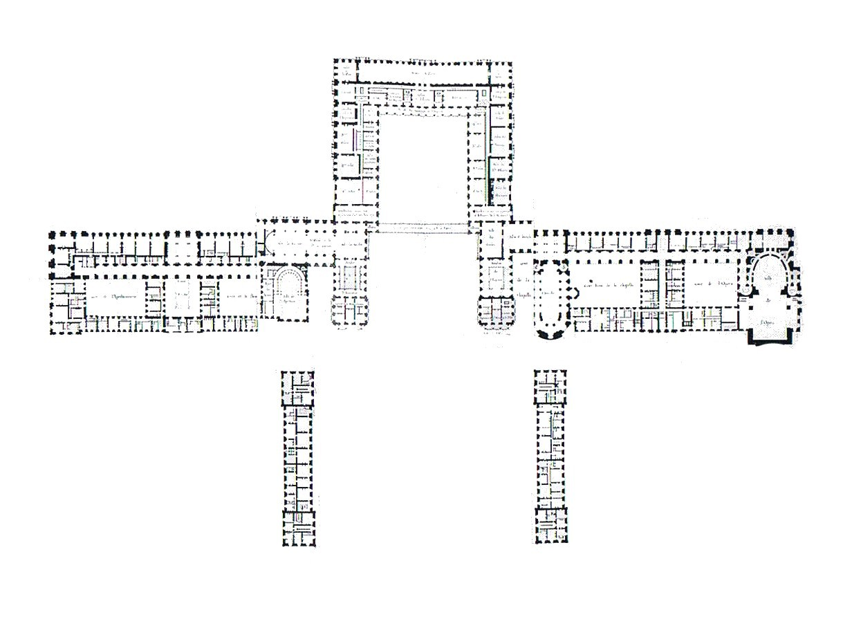 Premier projet pour la reconstruction de Versailles de Pierre Fontaine.